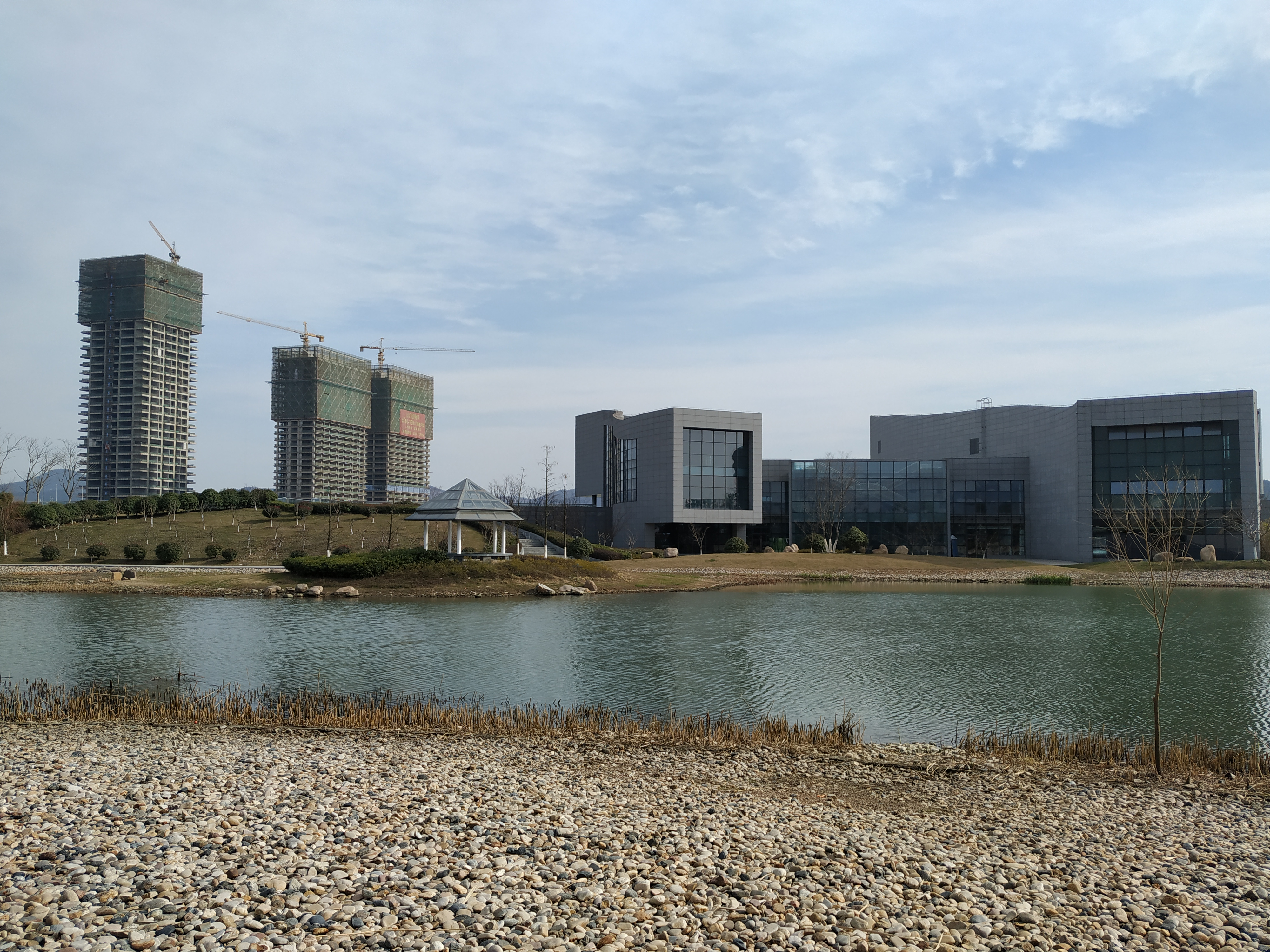 中文（中国大陆）: 南京市麒麟生态公园